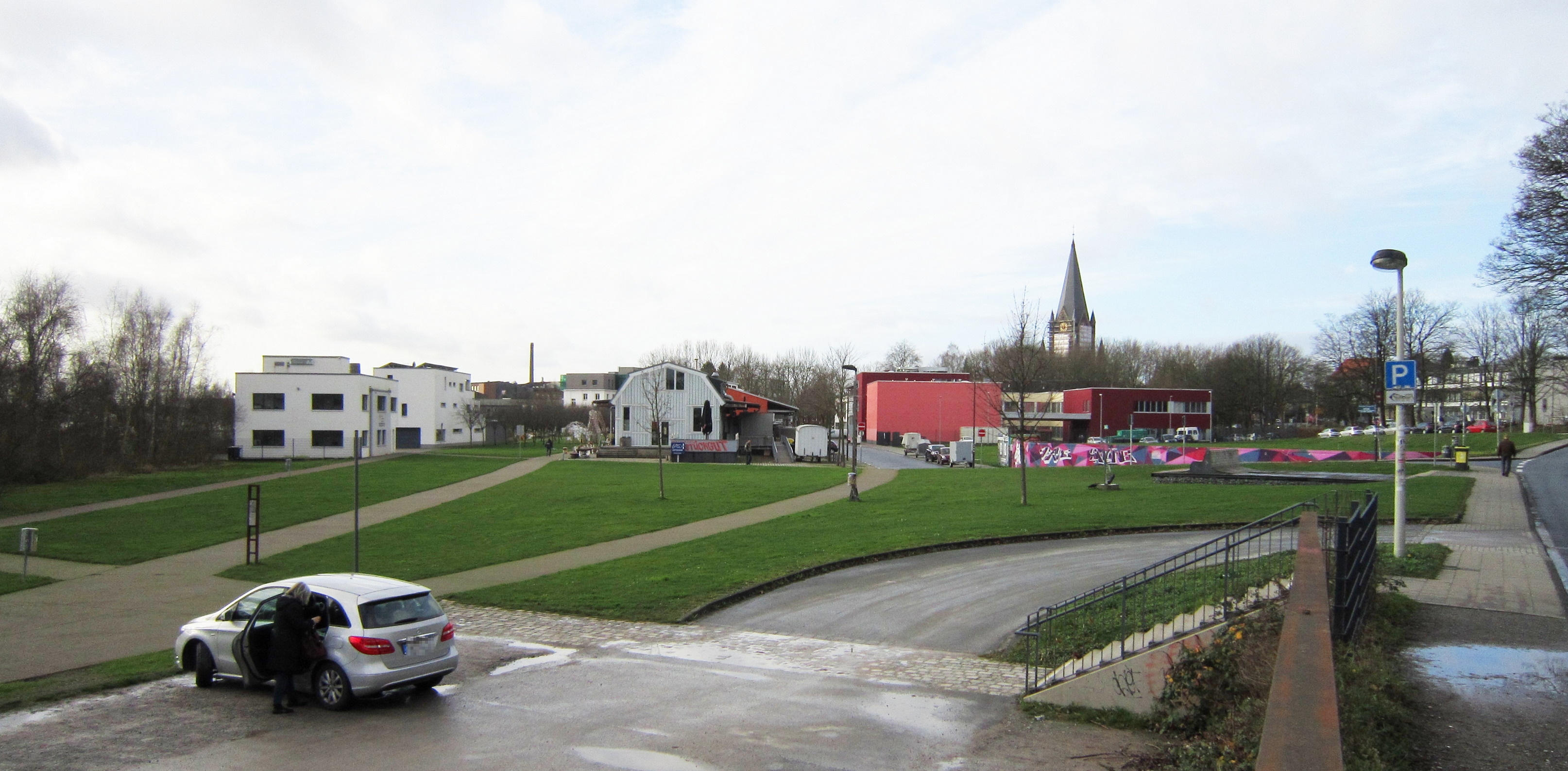 Südpark von Osten, aufgenommen im Dezember 2015